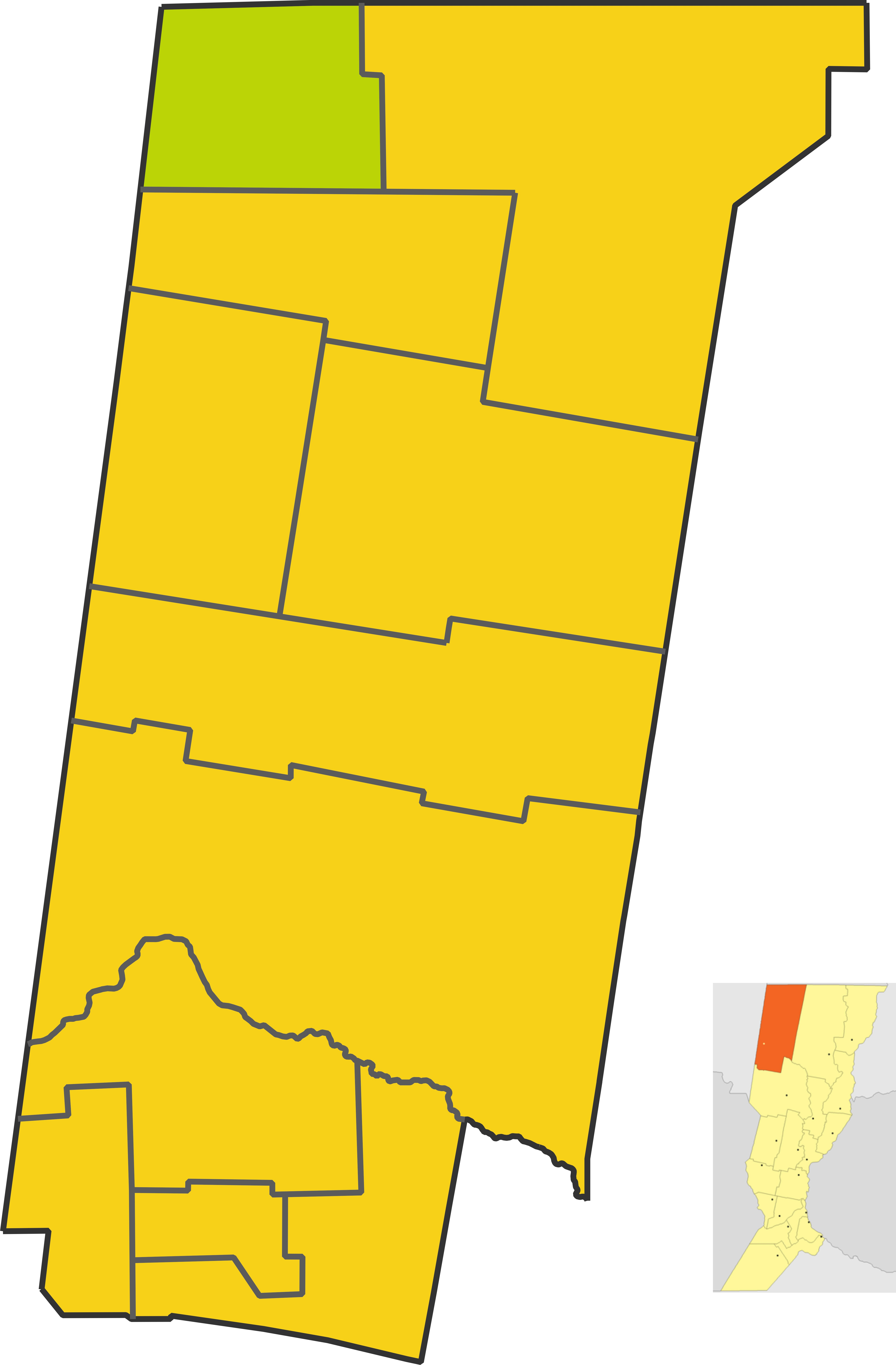 Map of the comuna de Gregoria Pérez de Denis in Nueve de Julio department, Santa Fe province, Argentina